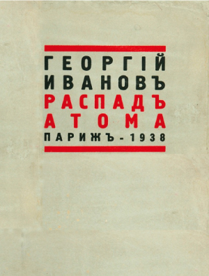 Georgij Ivanov. Raspad Atoma. Paris 1938, Covermontage Георгий Иванов. Распад атома. Париж 1938.